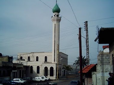 ساحة بلدة عبا - ويبدو فيها مبنى الجامع والحسينية